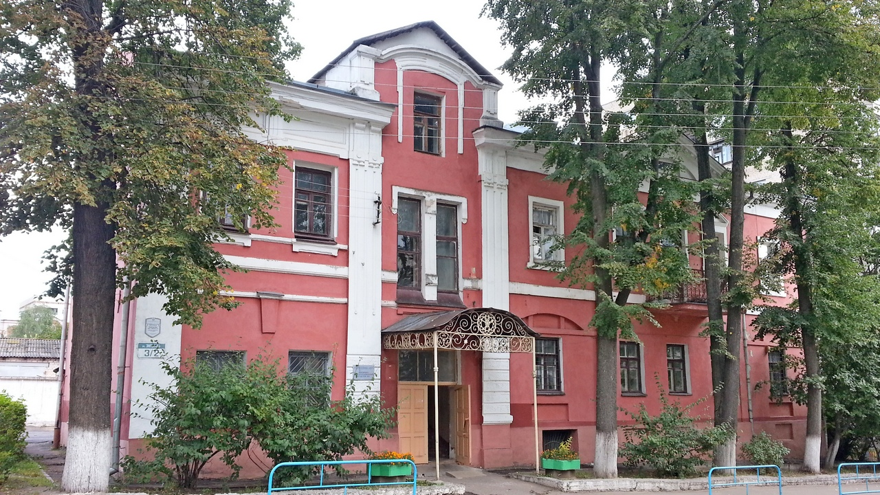 Беларуская (тарашкевіца): Забудова вул. Энгельса This is a photo of Belarusian heritage monument. Reference number: 213Г000105 ( WLM)